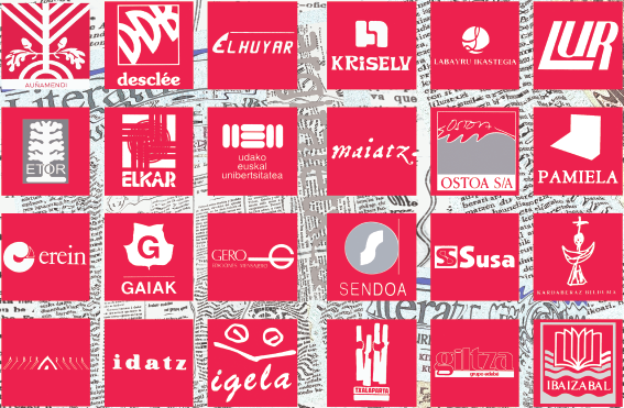 Euskal Herriko argitaletxeak